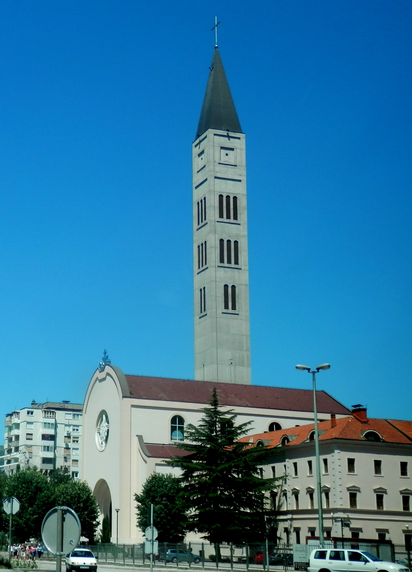 Mostar.Bosna a Hercegovina.